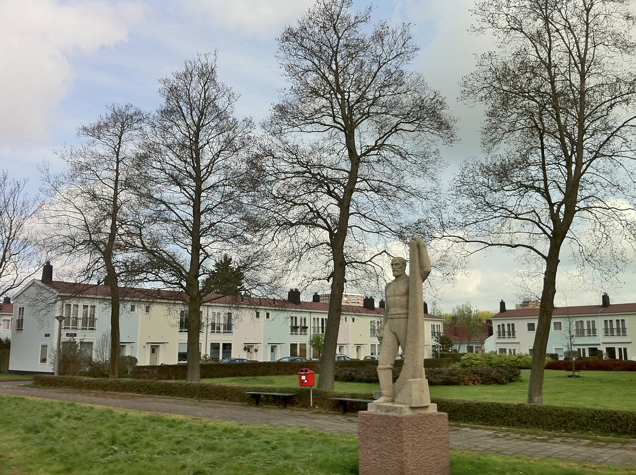 Airey-woningen van J.F. Berghoef aan het Enkhuizerplein in Amsterdam-Noord. Daarvoor Sculptuur "De Scheepstimmerman" van Johan Polet uit 1960 van Schelpkalksteen.